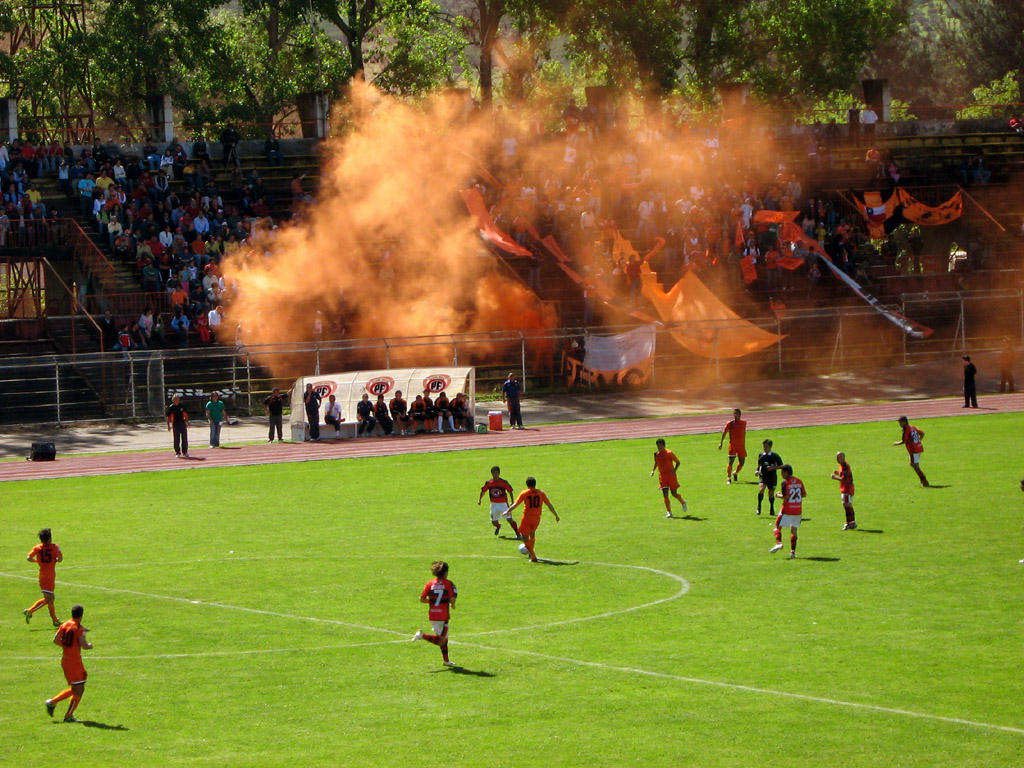 Partido de fútbol, Rangers 1:3 Cobreloa. Estadio Fiscal de Talca, Chile, 2006